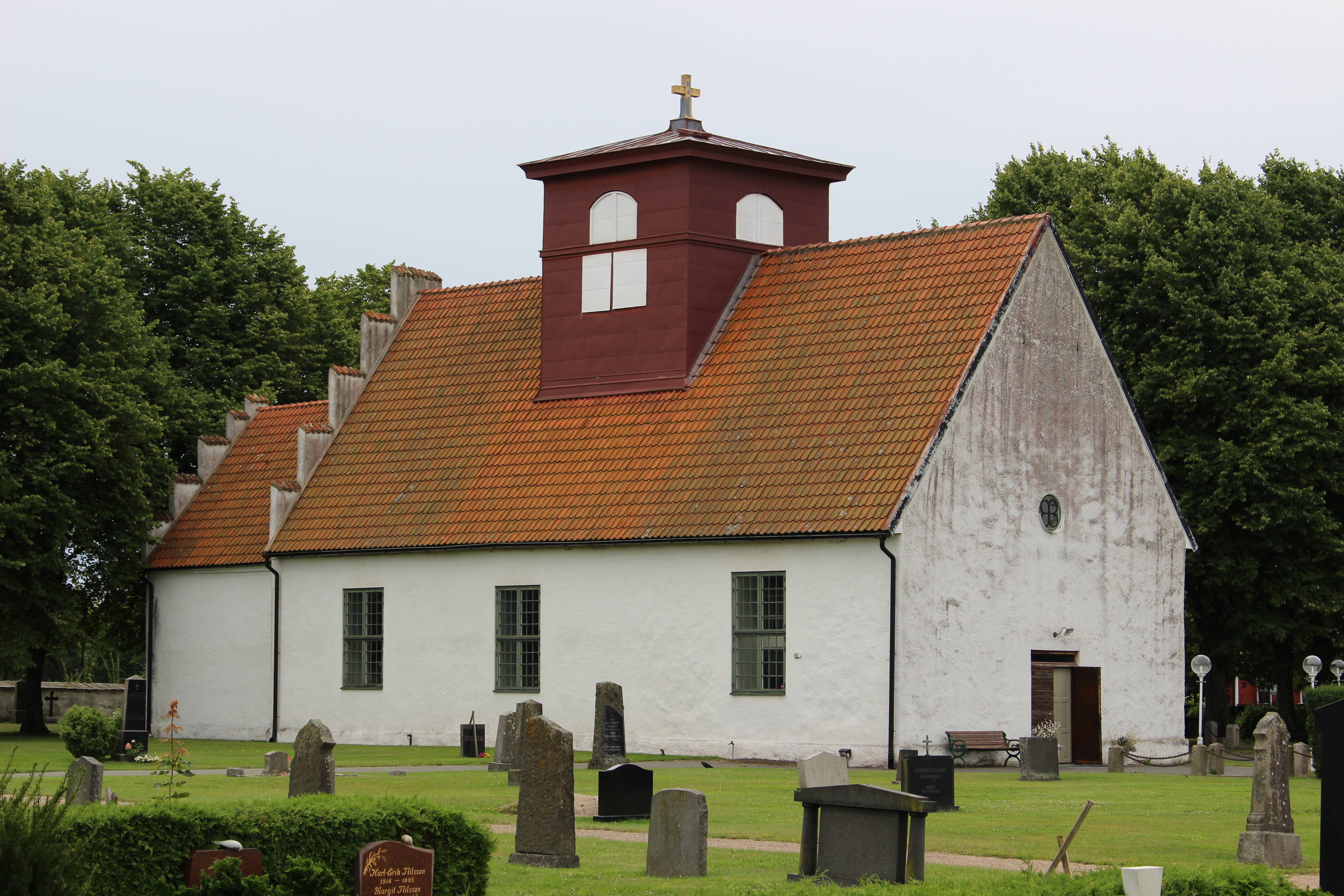 Rinkaby kyrka från nordväst